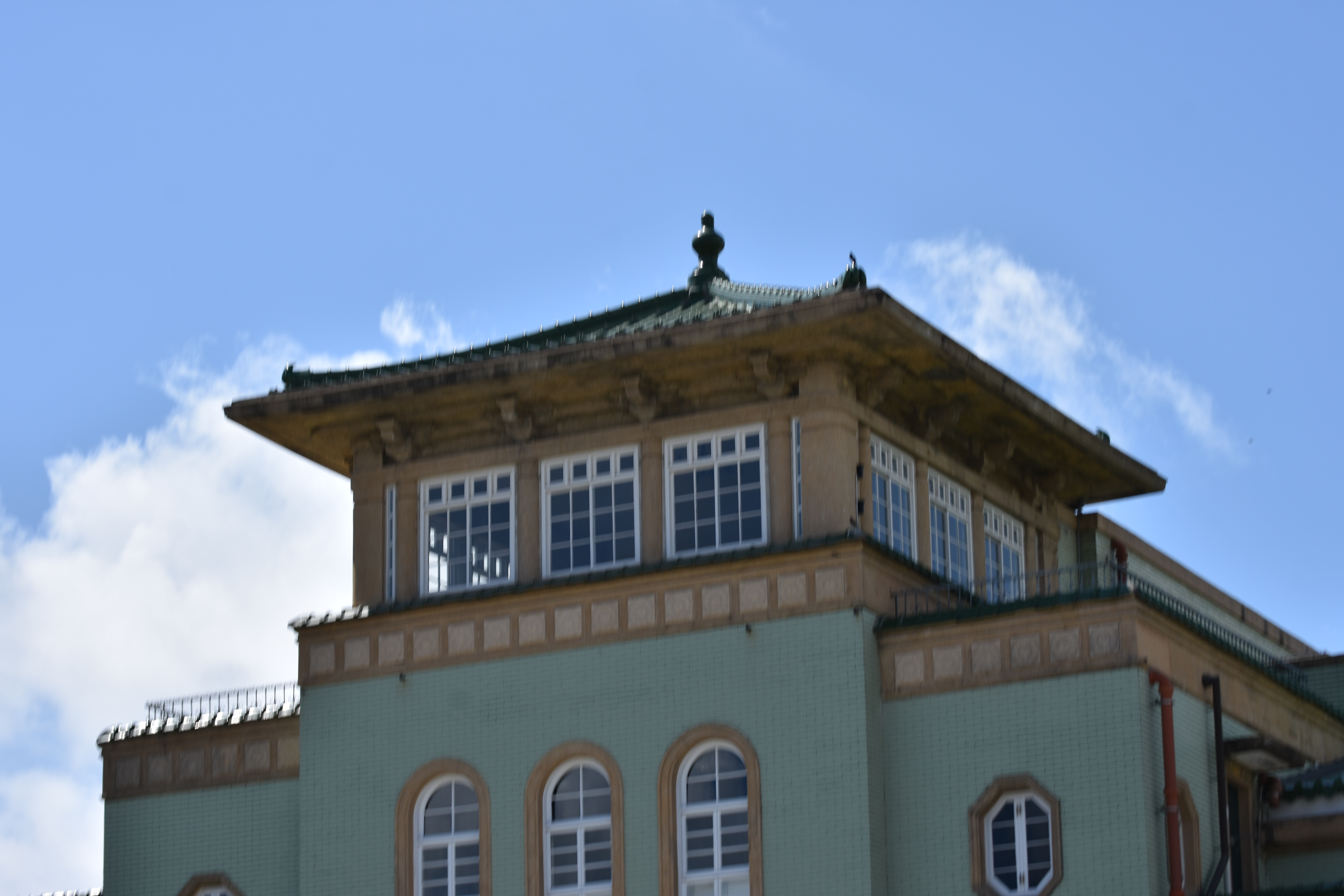 中文（台灣）: 高雄市役所